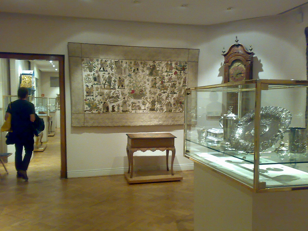 Noc Muze�w 2010 / Muzeum Narodowe